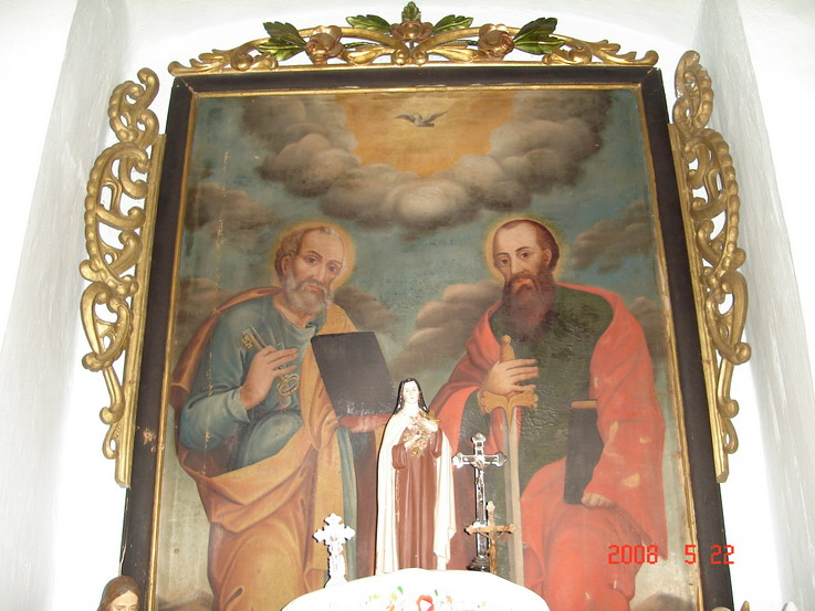 Kurtapataki kápolna oltára, Erdély